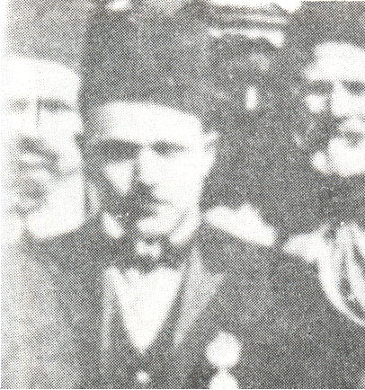 محمد بن عمر الأنسي (1880 - 1951)، من أقدم الشخصيات العربية التي خدمت في ديوان الأمير عبد الله بن الحسين مع البدايات الأولى لتأسيس الدولة الأردنية. وقد تولى منصب رئيس الديوان الأميري لثلاث مرات بالإضافة إلى المناصب النيابية والوزارية الأردنية، وكان صحفيا وأديبا.